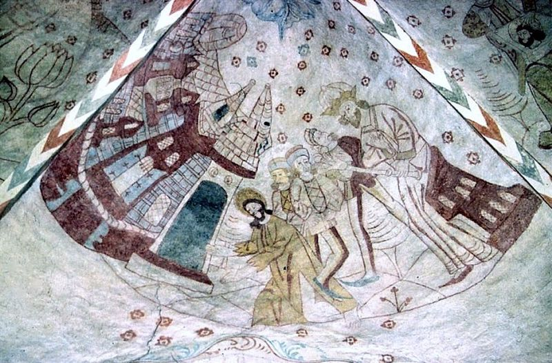 Fakse Kirke i Danmark. Tårnrum sydkappe, Johannes kastes i fængsel